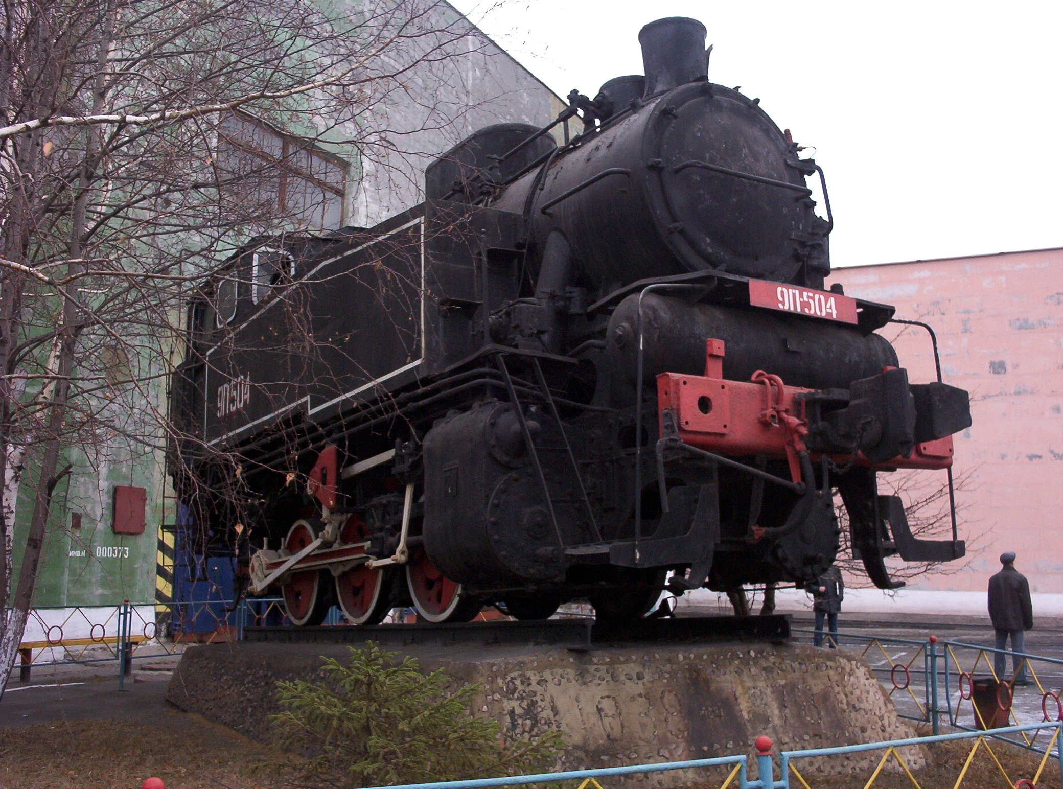 Паровоз-памятник 9П-504 Муромского паровозостроительного завода. Фотография сделана в 2005 году на металлургическом комбинате г.Нижний Тагил, цифровой фотокамерой Kodak EasyShare CX4300 с разрешением 3.2 Мпкс. Автор снимка Воловик Виталий Владимирович.